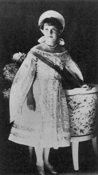 Anastasia Nikolaevna (1901-1918)